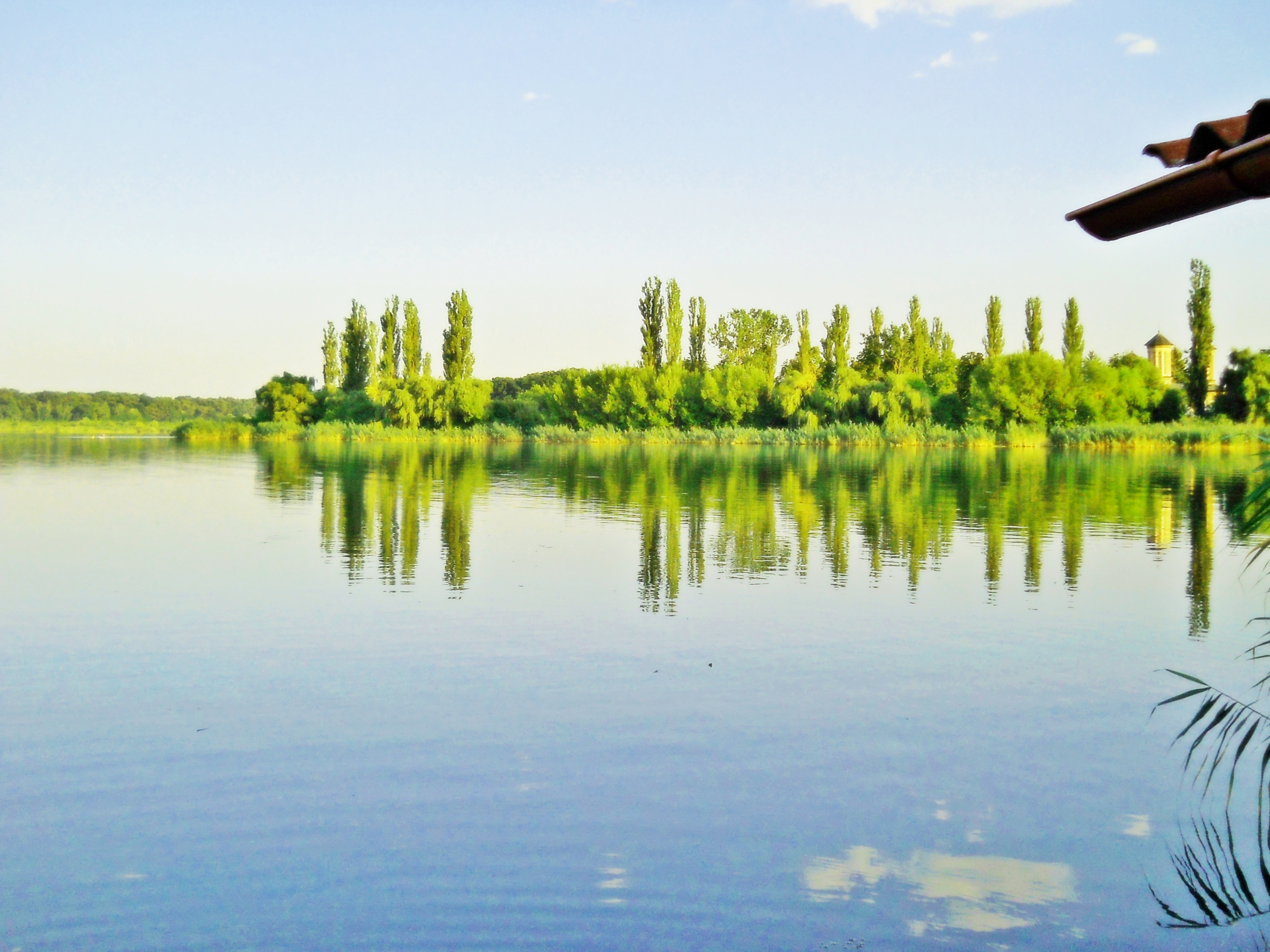 Lacul Snagov